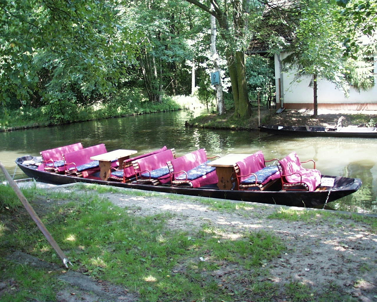 Ein Ausflugskahn im Spreewald (Burg)